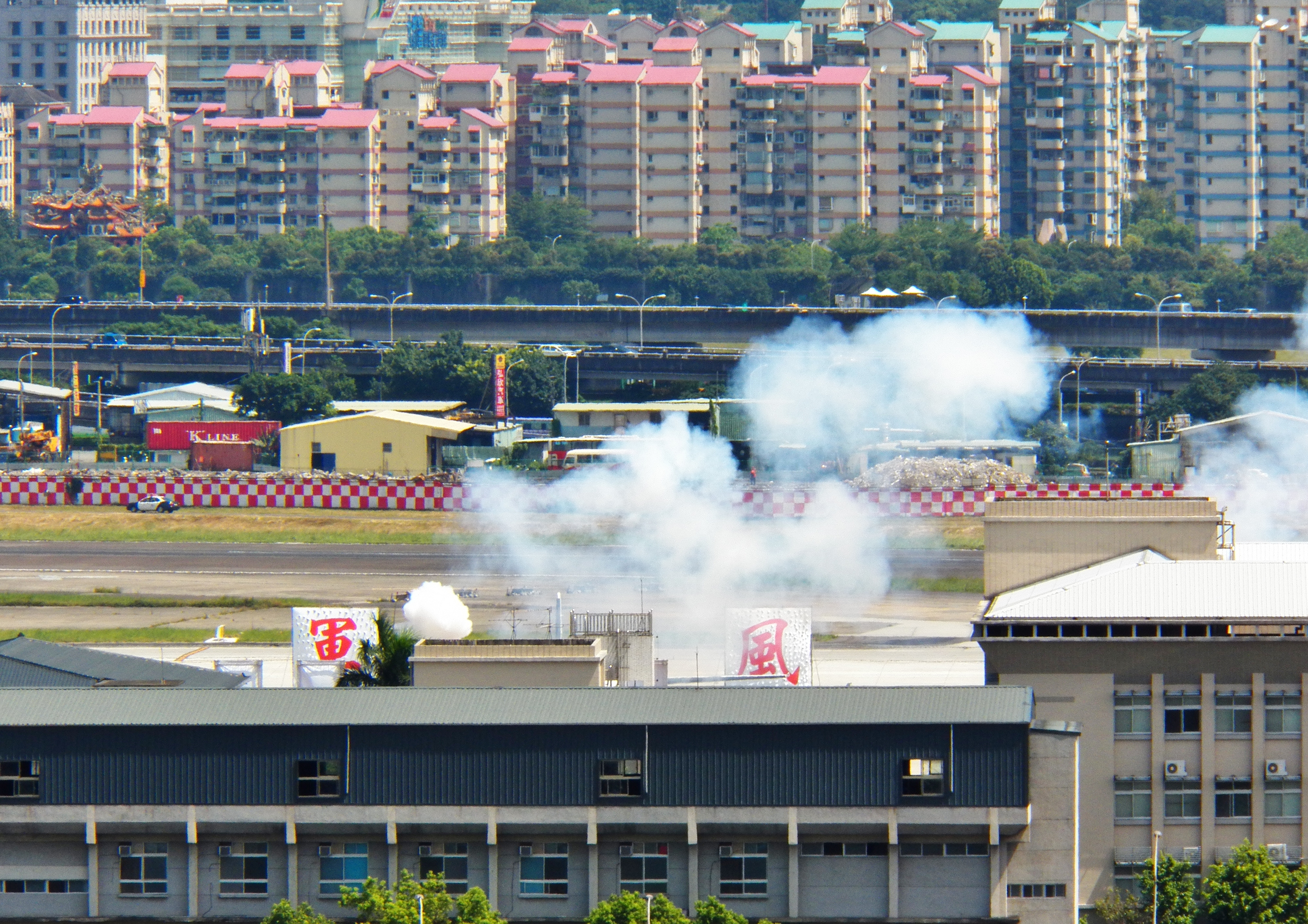 2012年7月10日上午10時翔鷗操演，空軍松山基地射擊二十一響禮砲，恭迎馬英九總統蒞臨校閱。